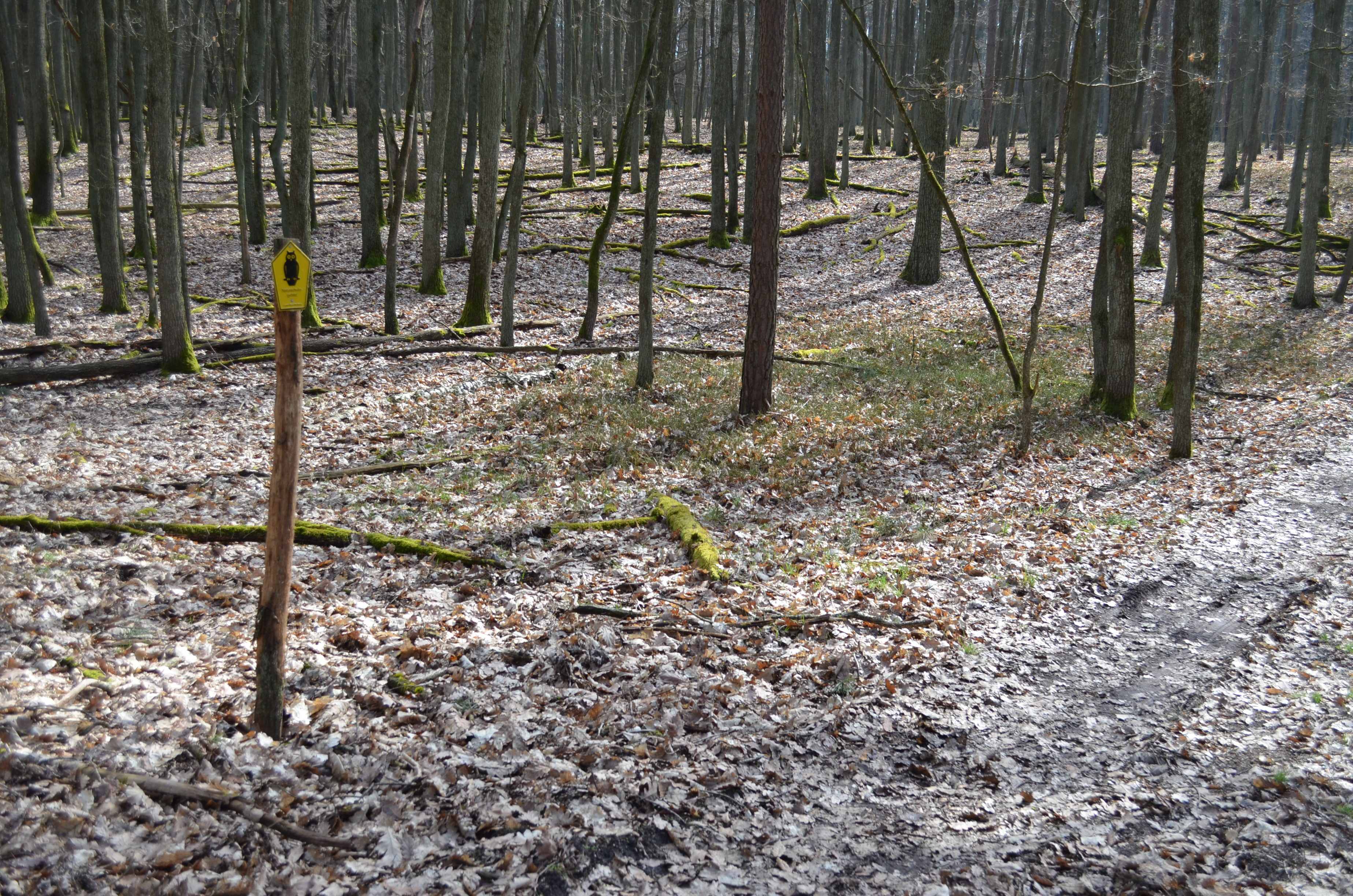 Urwald Fünfeichen, Blick vom westlichen Rand nach Osten